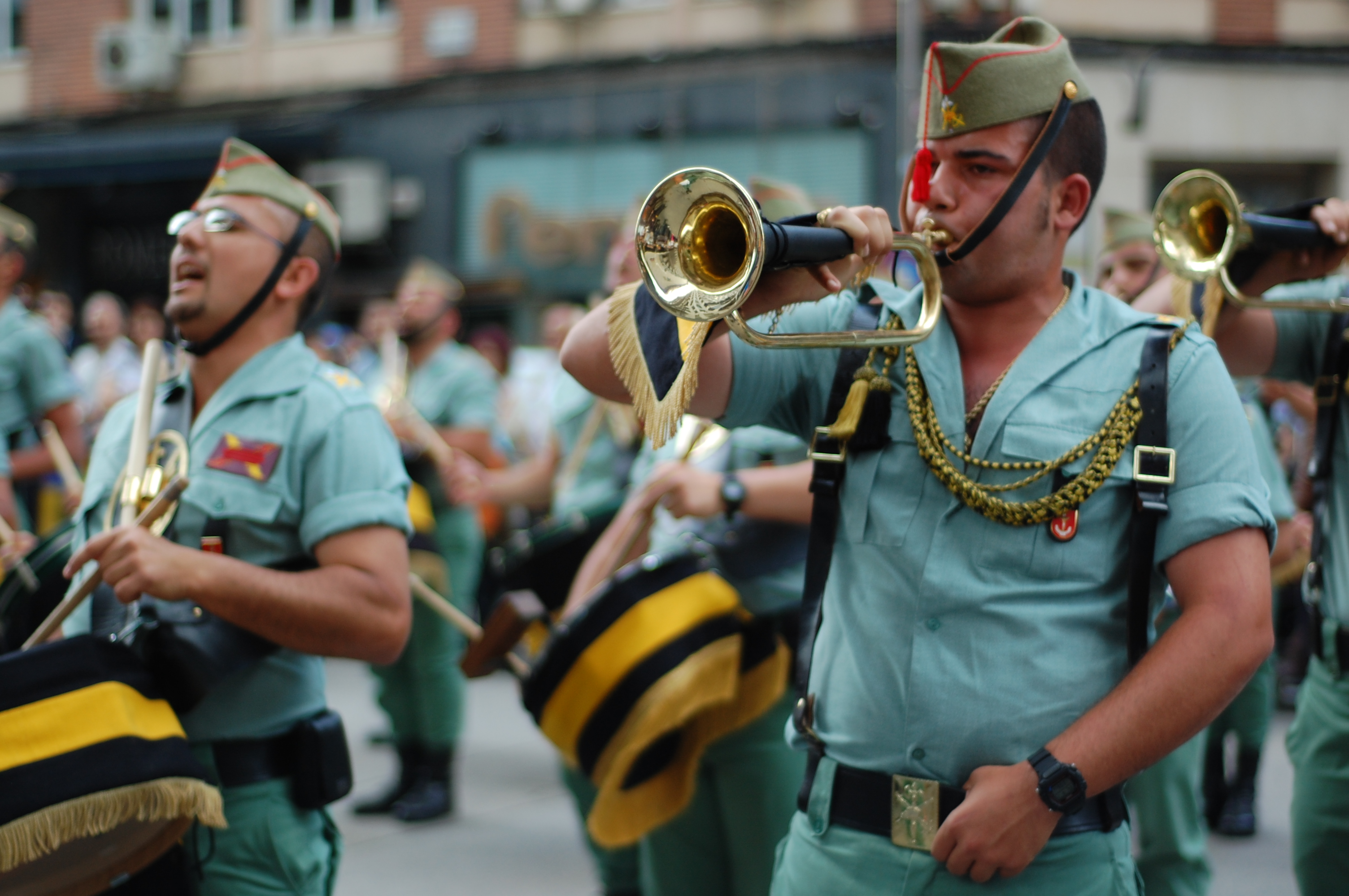 Banda militar (Legión española)